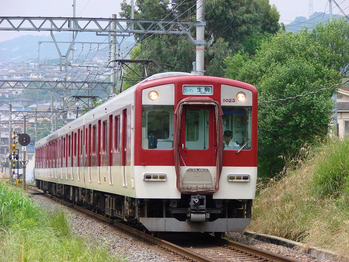 近鉄 1020系